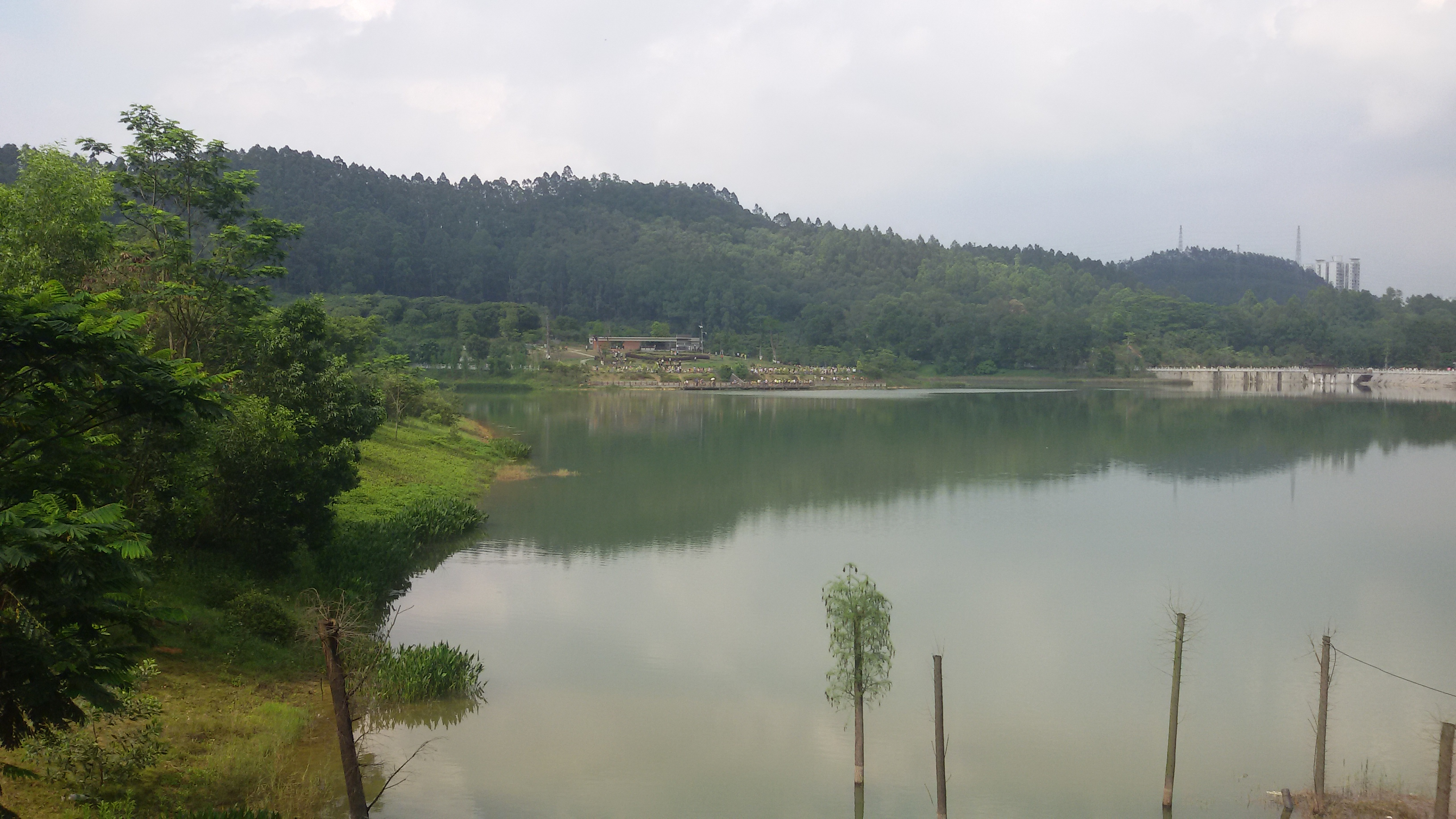 粵語: 大夫山森林公园嘅中心湖